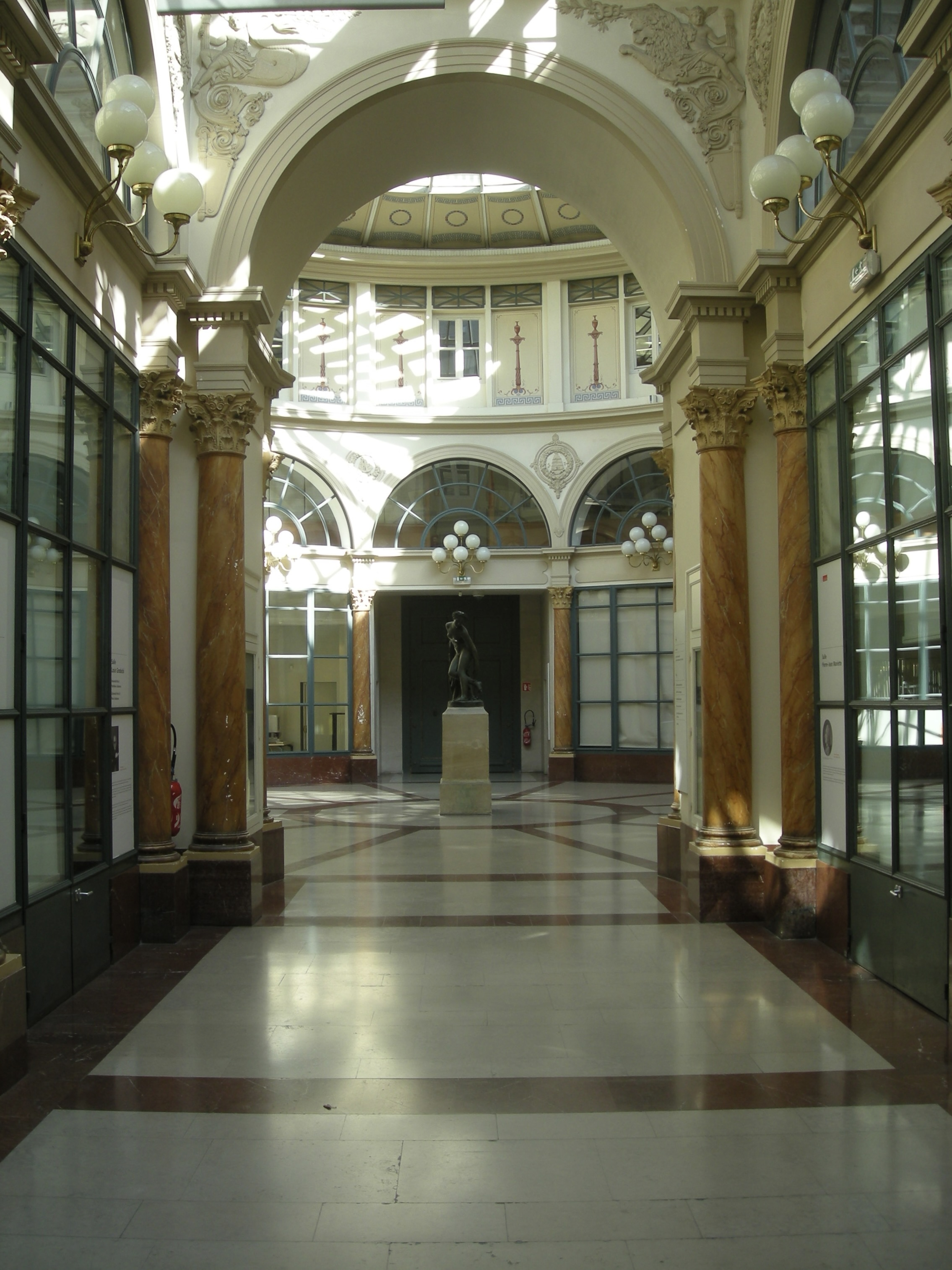 Galerie Colbert, Paris.